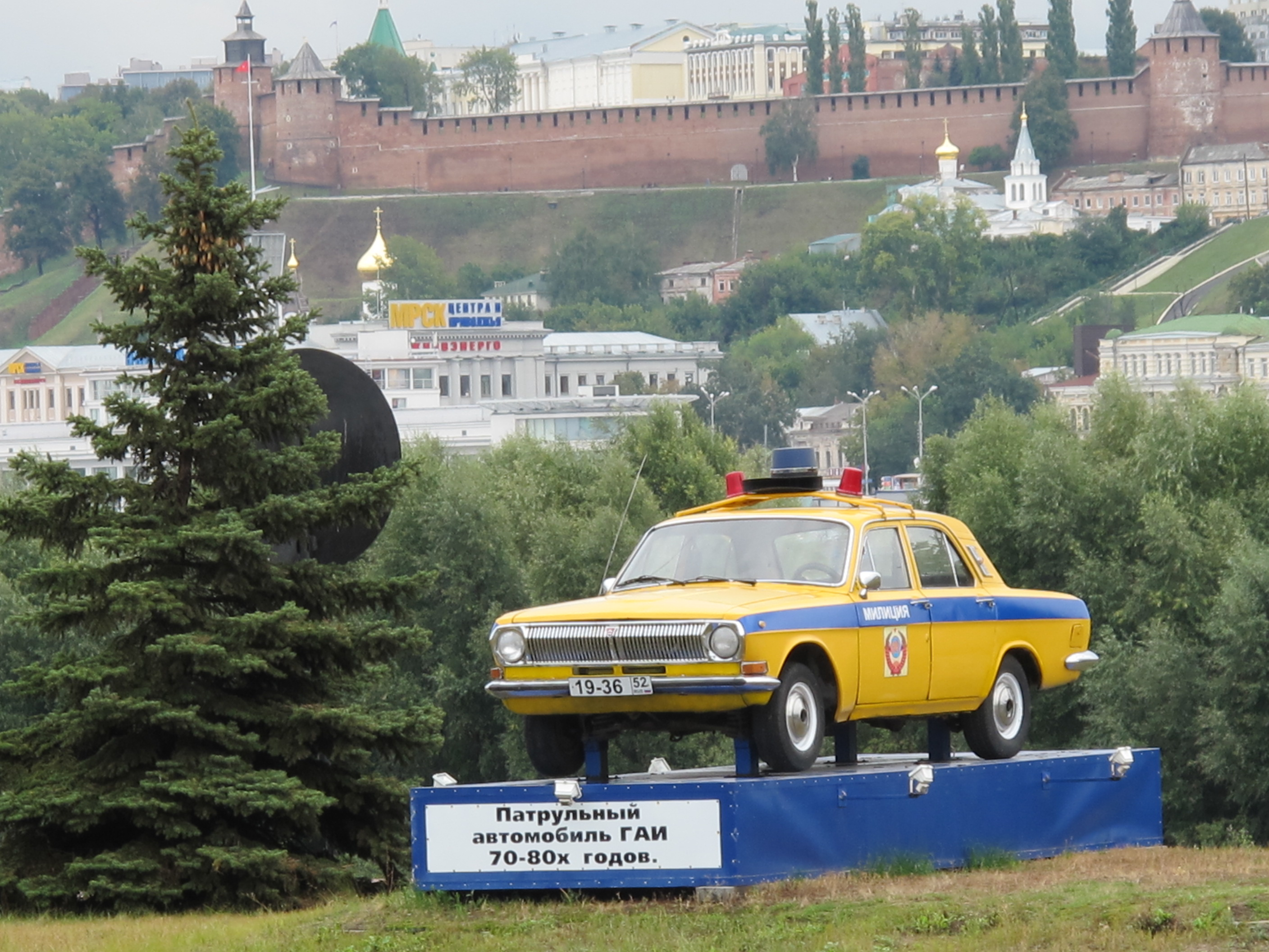 Мемориальный милицейский патрульный автомобиль «Волга» перед зданием ГИБДД Нижнего Новгорода, на фоне стен Нижегородского Кремля